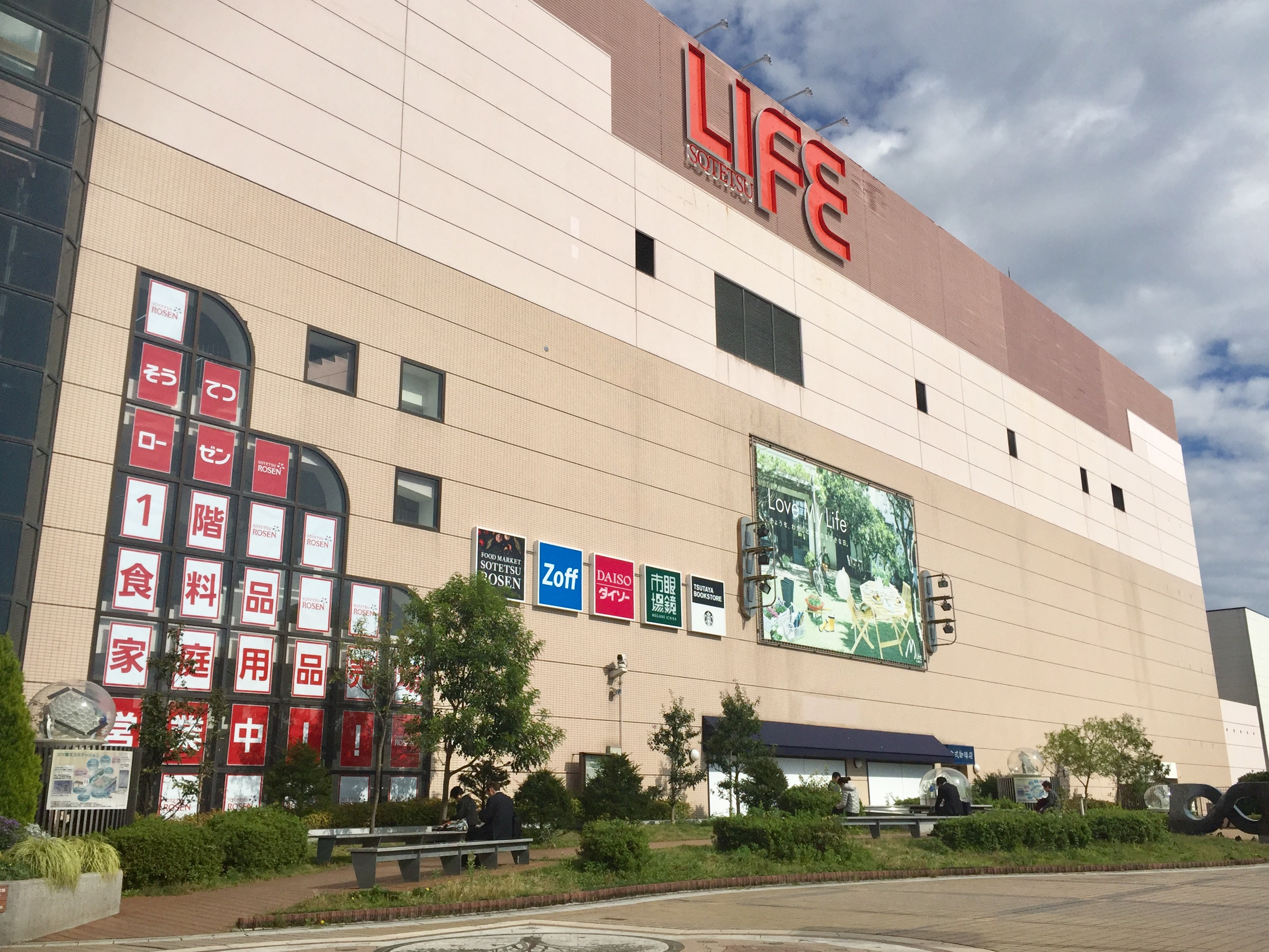 相鉄線三ツ境駅の駅ビル「相鉄ライフ 三ツ境」（三ツ境ライフ）の外観。2018年のリニューアル後。